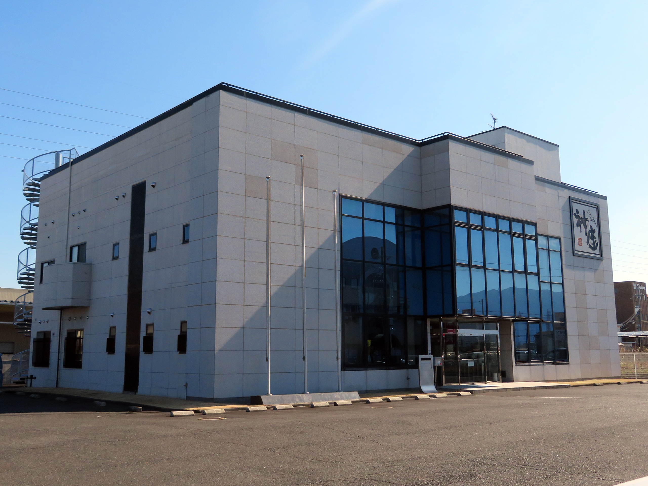 株式会社理想実業本社を撮影。